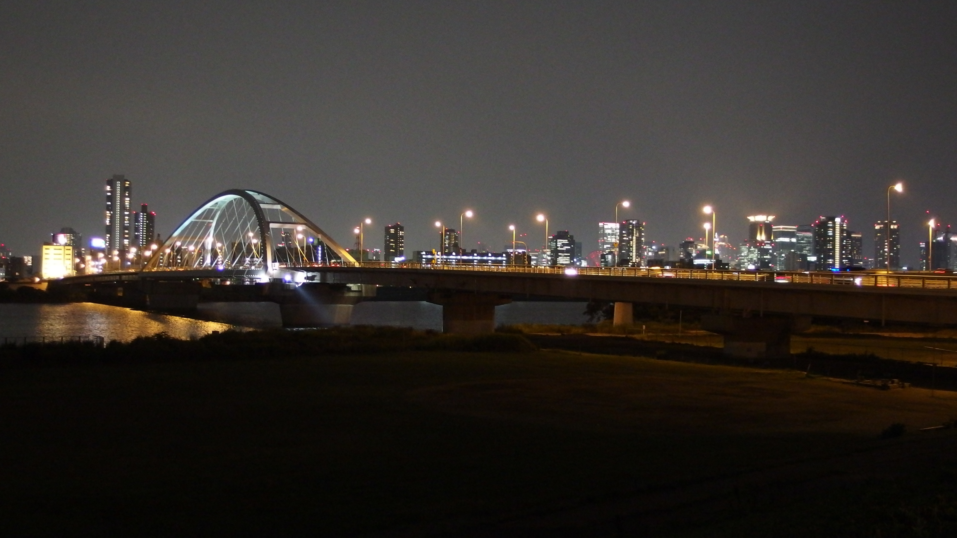 長柄橋の夜景